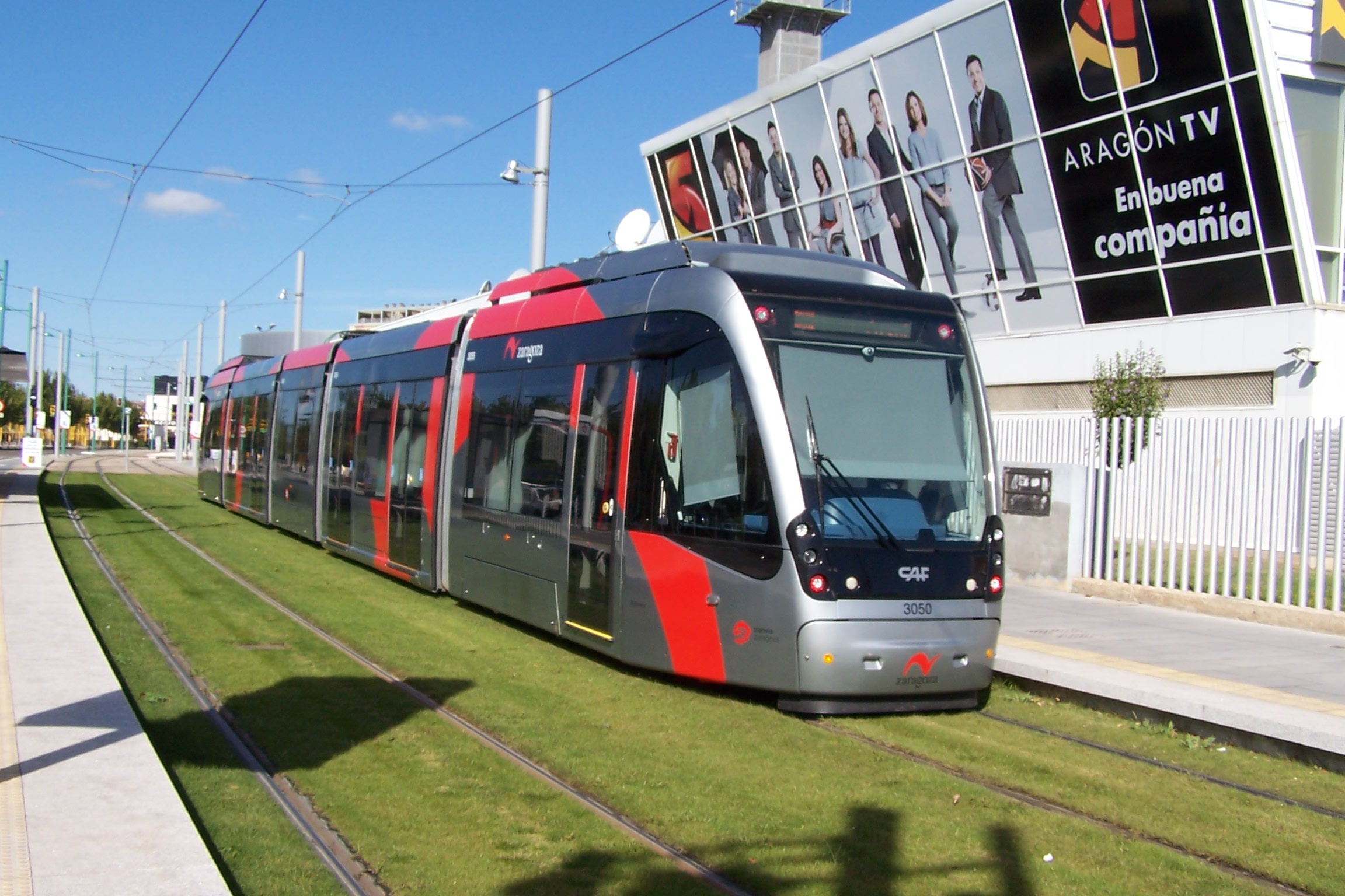 Urbos 3 der Straßenbahn Saragossa an der Haltestelle La Chimenea. An dieser Haltestelle beginnt wieder die Oberleitung, deshalb ist der Stromabnehmer noch unten.